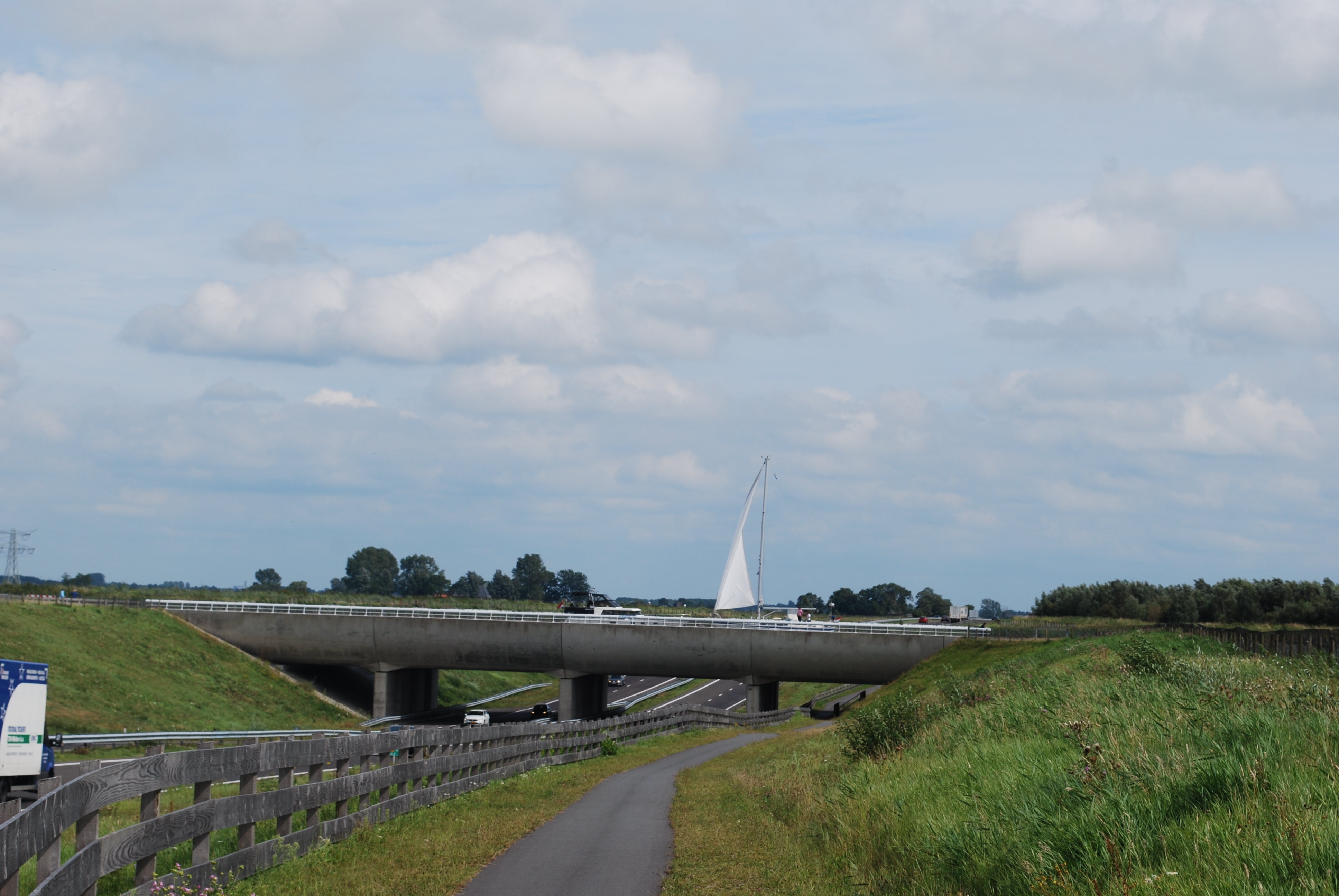 Aquaduct Langdeel